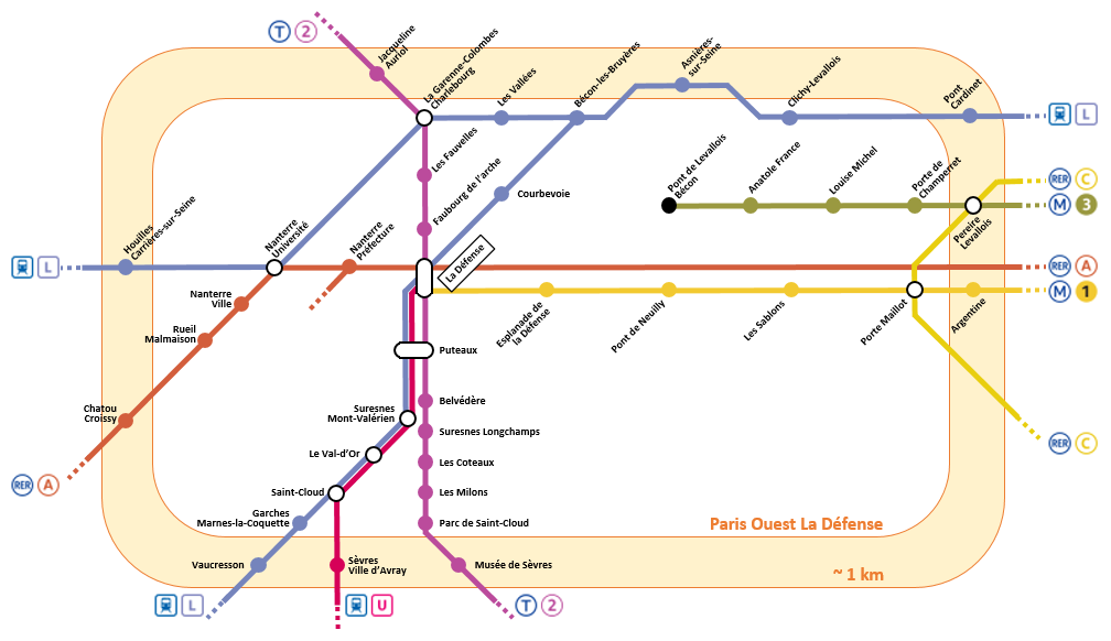 Transports à Paris Ouest La Défense et alentours